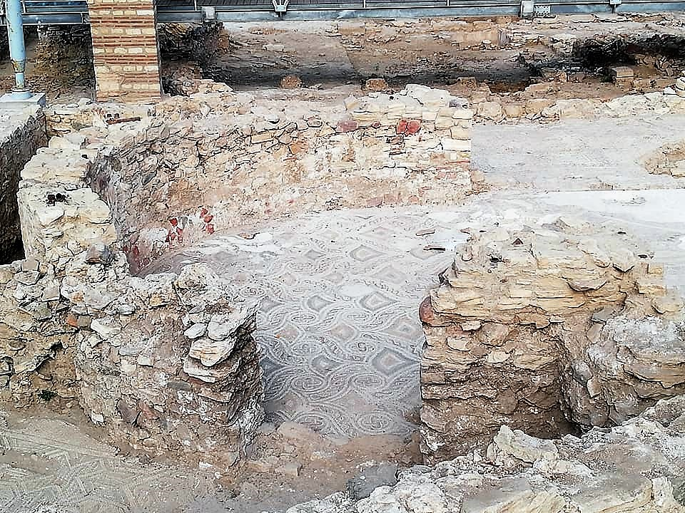 Mosaico